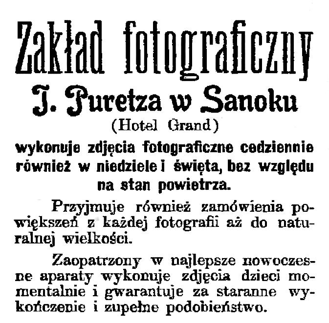 Ogłoszenie reklamowe zakładu fotograficznego Jakuba Puretza w Sanoku (1904)